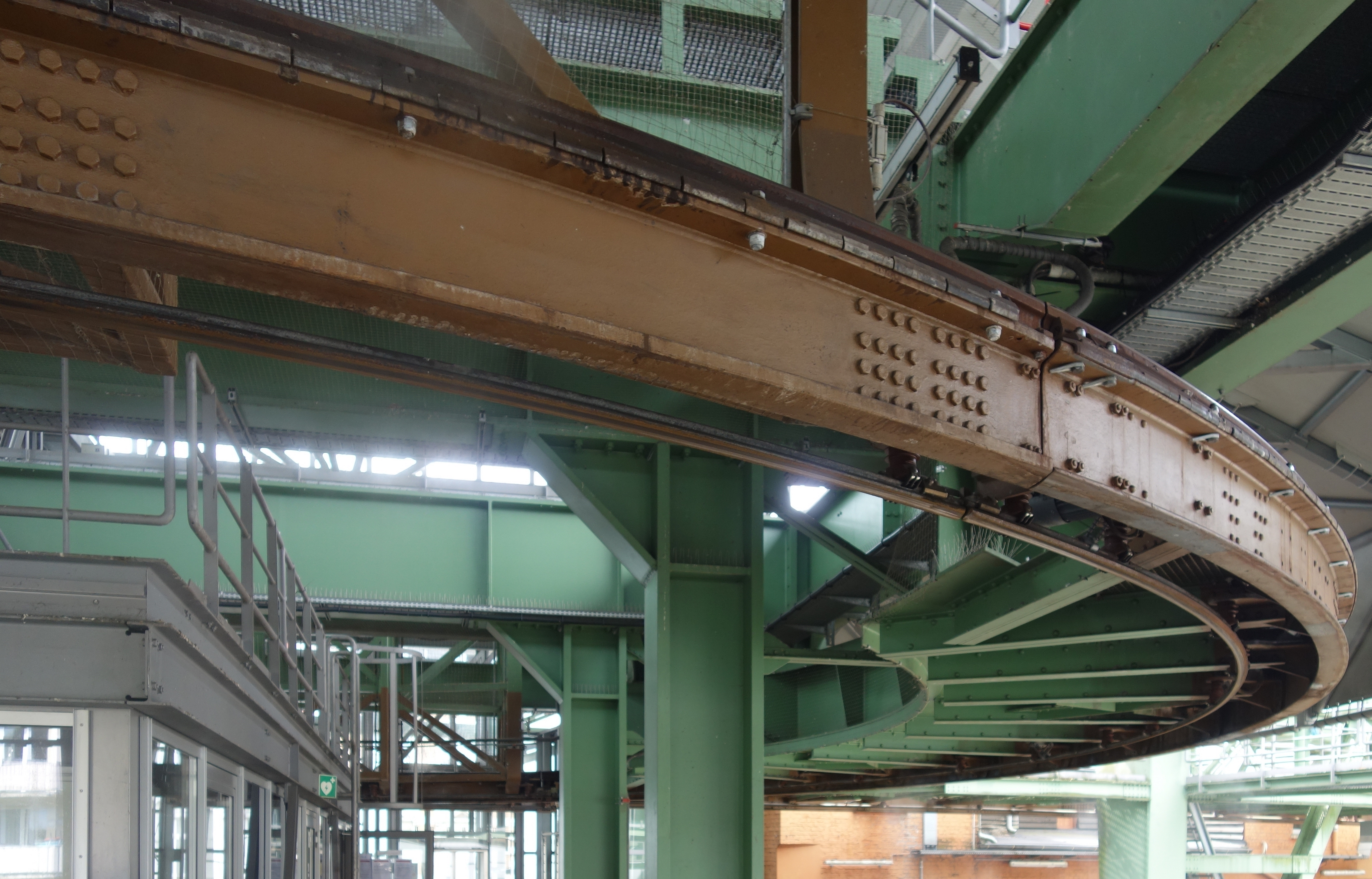 Wendeschleife am Schwebebahnhof Wuppertal-Vohwinkel